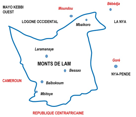 Carte macroscopique du département des Monts de Lam